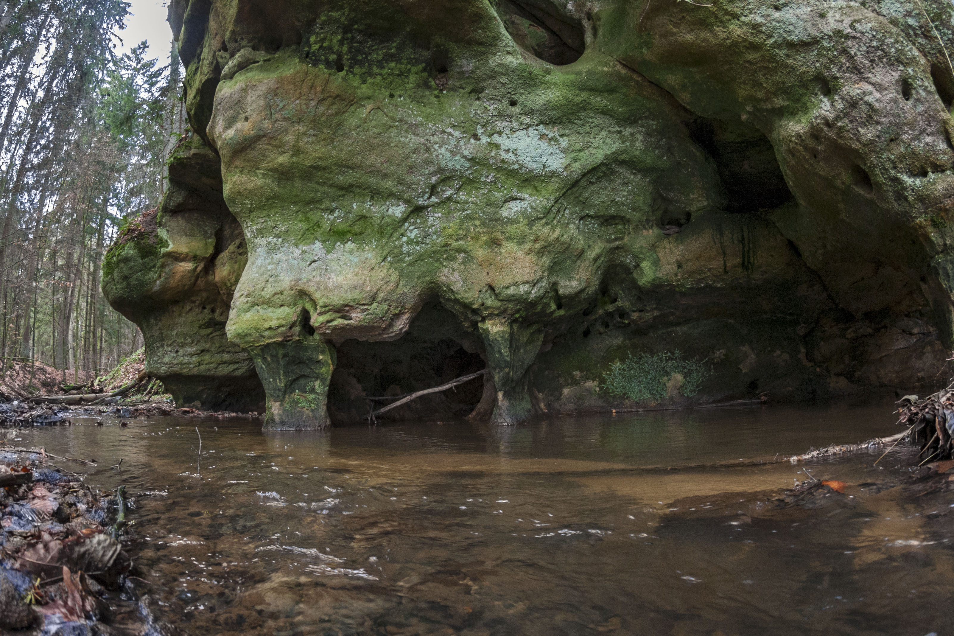 Rumpelbachschlucht, Röthenbach